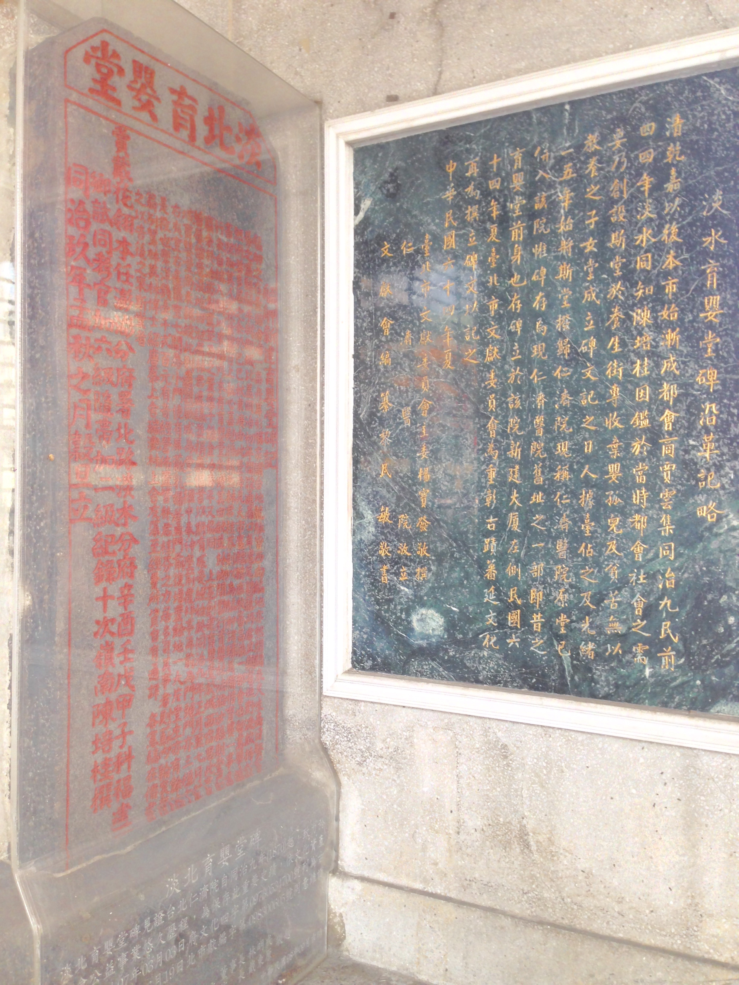 中文（台灣）: 淡水育嬰堂碑沿革記略，1975年夏季臺北市文獻委員會主任委員楊寶發撰，仁濟醫院立。